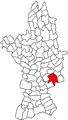 Categorie:Hărţi ale judeţului Olt